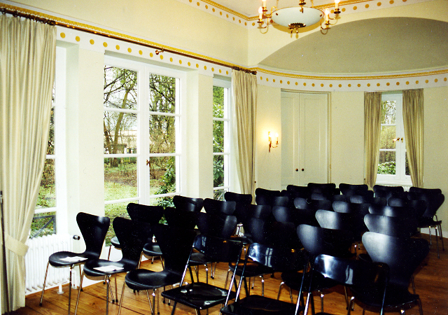 Heine-Haus (Hamburg-Altona), Innenraum This is a photograph of an architectural monument.